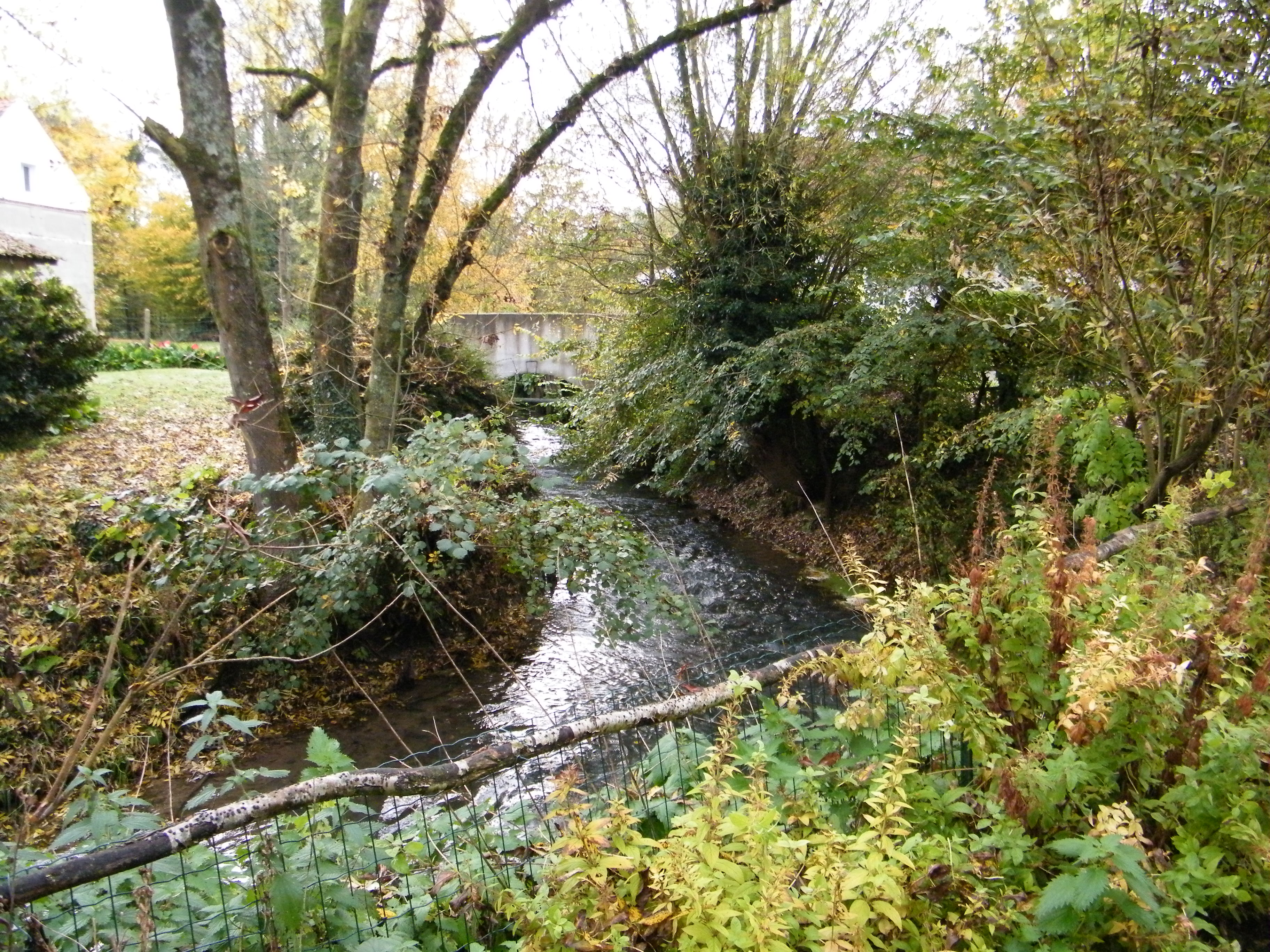 Argoules, Somme, Fr, Authie, rue du moulin.